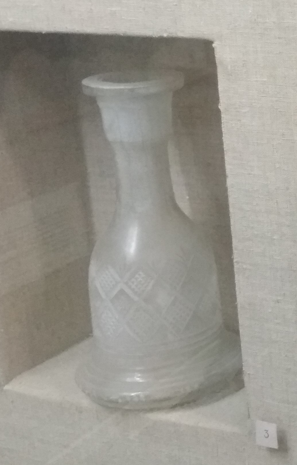 Гродна (2018). Гродзенскі дзяржаўны гісторыка-археалагічны музей. 3 - графін. Урэцка-налібоцкая мануфактура. XVIII ст. 4 - Скарбы, знойдзеныя ў раёне г. Гродна (мед???) ??? в. Дзераўная пад Слонімам (шасціграшовікі. XVIII ст). 5 - Кубак і гаршчочак. Кераміка. XVI-XVII стст